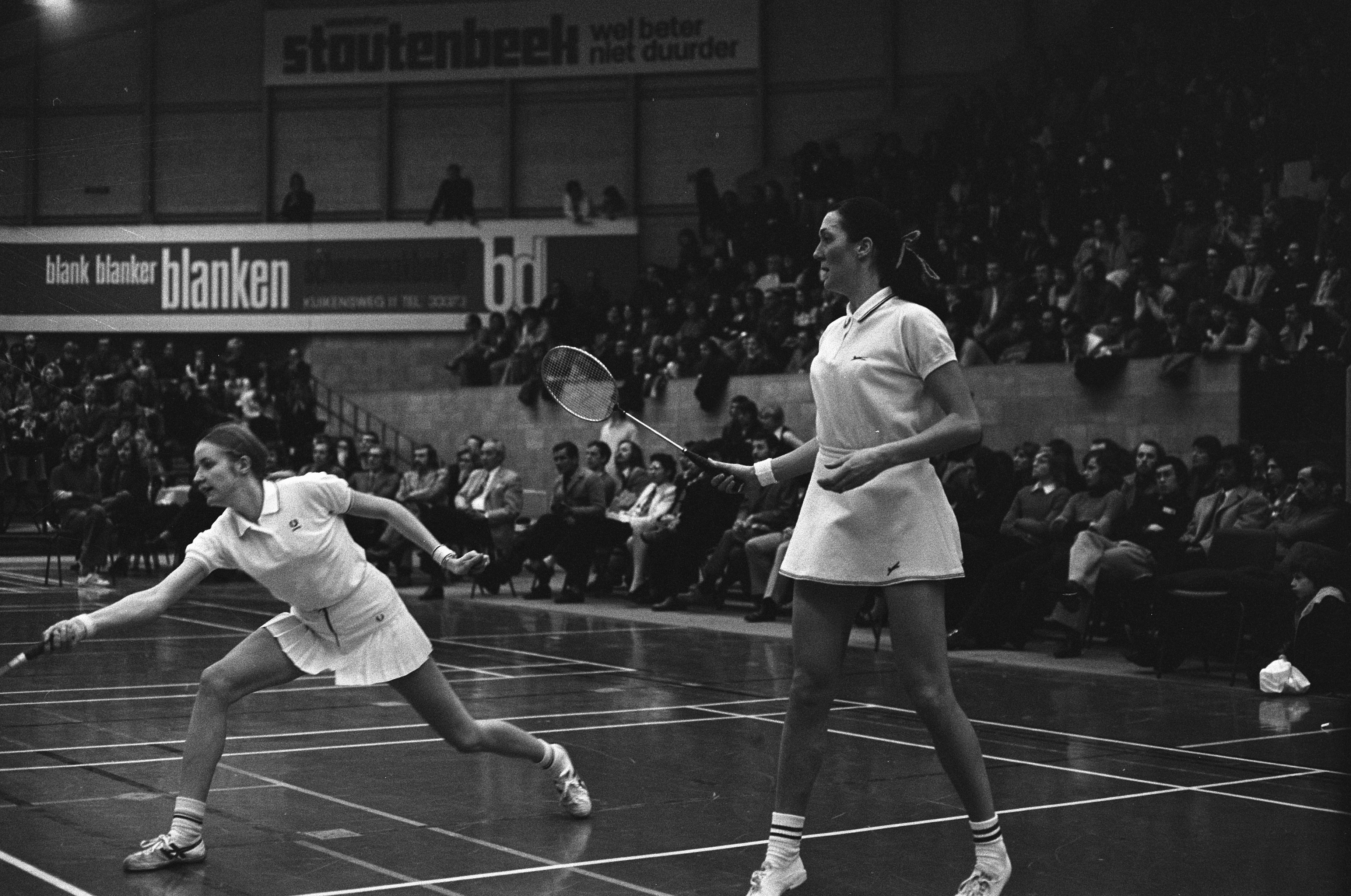 Collectie / Archief : Fotocollectie Anefo Reportage / Serie : [ onbekend ] Beschrijving : Internationale kampioenschappen Badminton te Beverwijk Datum : 11 februari 1973 Locatie : Beverwijk Trefwoorden : BADMINTON, KAMPIOENSCHAPPEN Fotograaf : Croes, Rob C. / Anefo Auteursrechthebbende : Nationaal Archief Materiaalsoort : Negatief (zwart/wit) Nummer archiefinventaris : bekijk toegang 2.24.01.05 Bestanddeelnummer : 926-2173